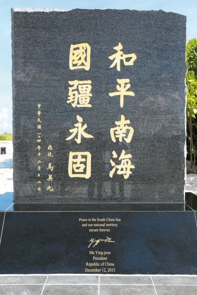 中文（台灣）: 2015年12月12日揭幕的太平島上的紀念碑，中華民國總統馬英九親筆題字“和平南海國疆永固”